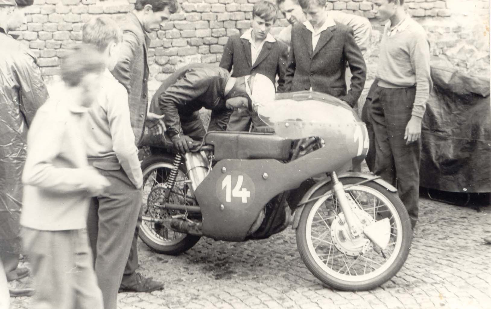 Így nézet ki a Jawa néhány év megfeszített munkája után , ez már egy vérbeli versenymotor volt a teljesítményét 16-ról 42,5 LE-re növelték, a végsebessége 214 Km/h volt.